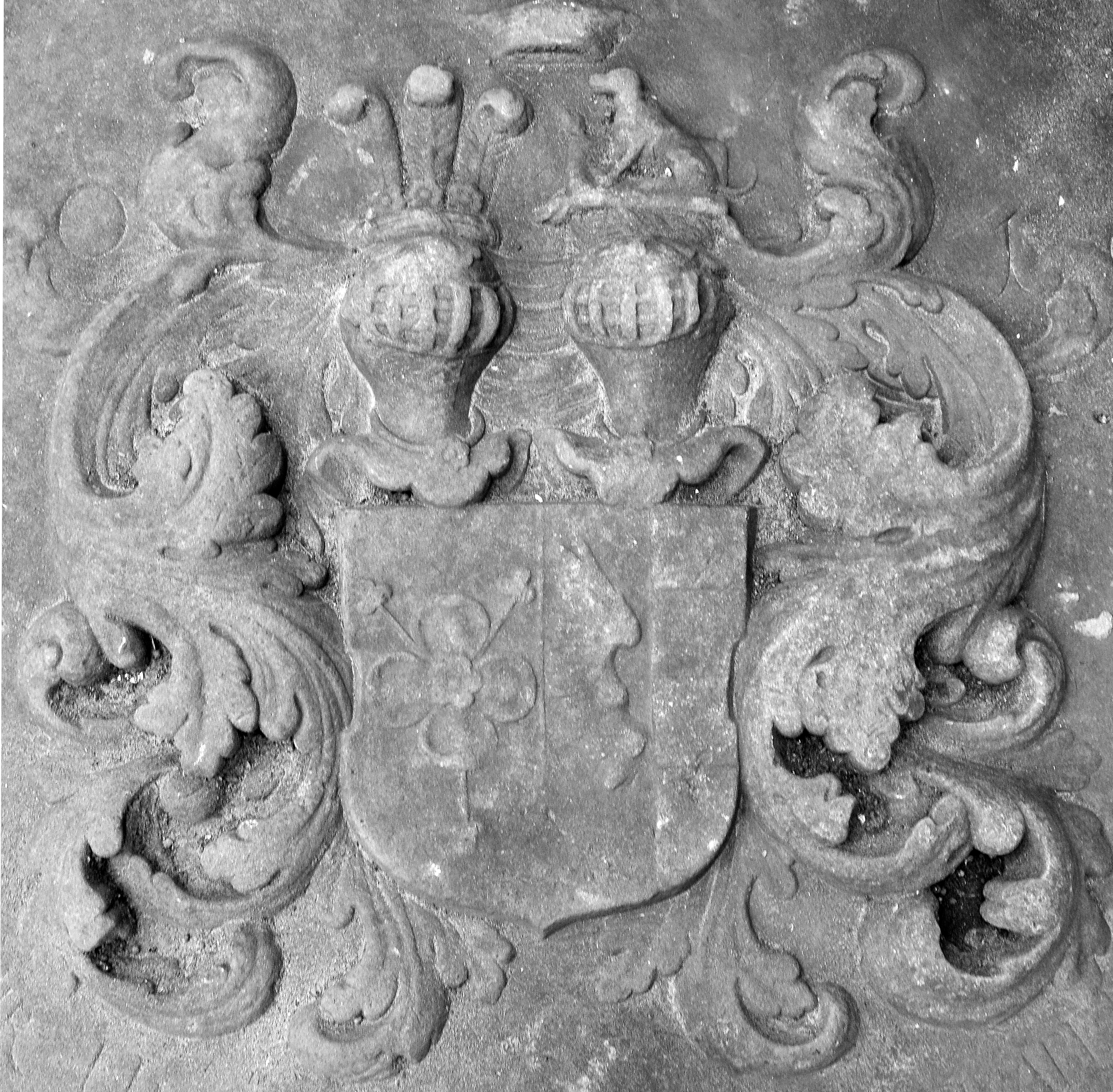 Wappen des uralten holsteinischen Adelsgeschlechts von Schwaben. Vermutlich wird hier ein Allianzwappen zweier Familien dargestellt. Das Wappen ist gespalten. Rechts eine gefüllte vierblättrige Blüte die mit drei kleinen dreiblättrigen gestielen Kleeblättern, die nach schräglinks und schrägrechts sowie senkrecht nach unten zeigen, besteckt ist. Links gespalten, vorne ein Flügel, hinten dreifach geteilt. Zwei Helme, vorn auf dem Helm ein Türkenbund mit drei Blüten und drei Pfaunewedel besteckt, hinten auf dem Helm ein Türkenbund, darauf ein auf einem Kissen sitzender Hund.